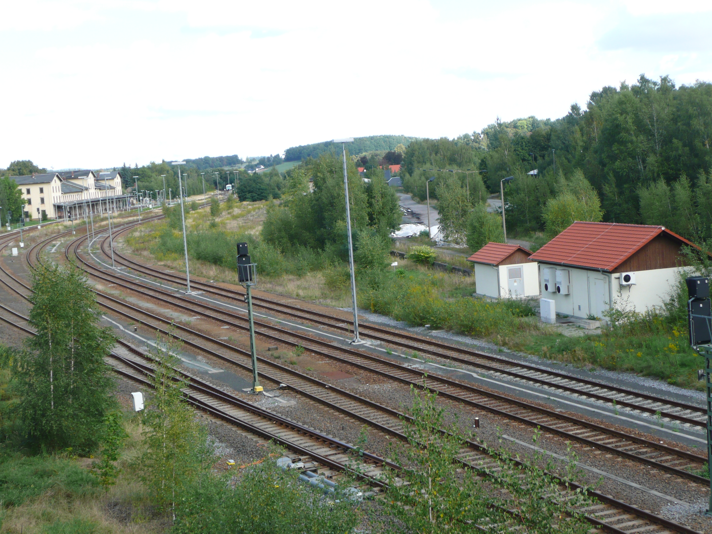 Gleisseite des Bahnhofes Ebersbach von der Georgswalder Brücke aus (2015)